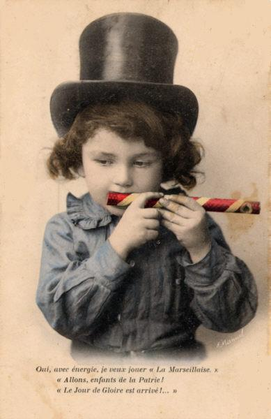 Enfant jouant du mirliton.